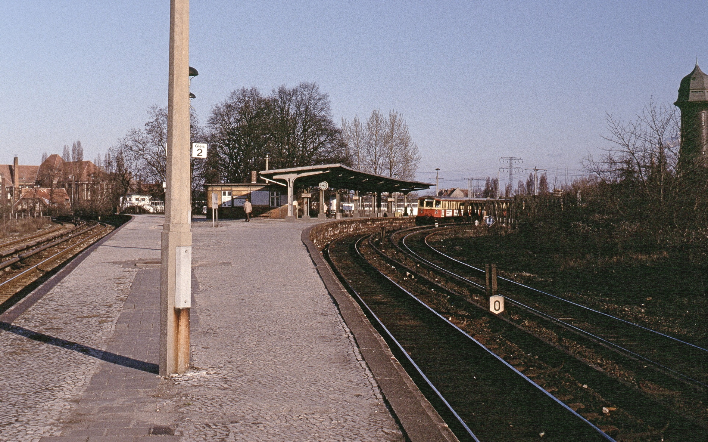 Verbindungskurven Berlin-Ostkreuz